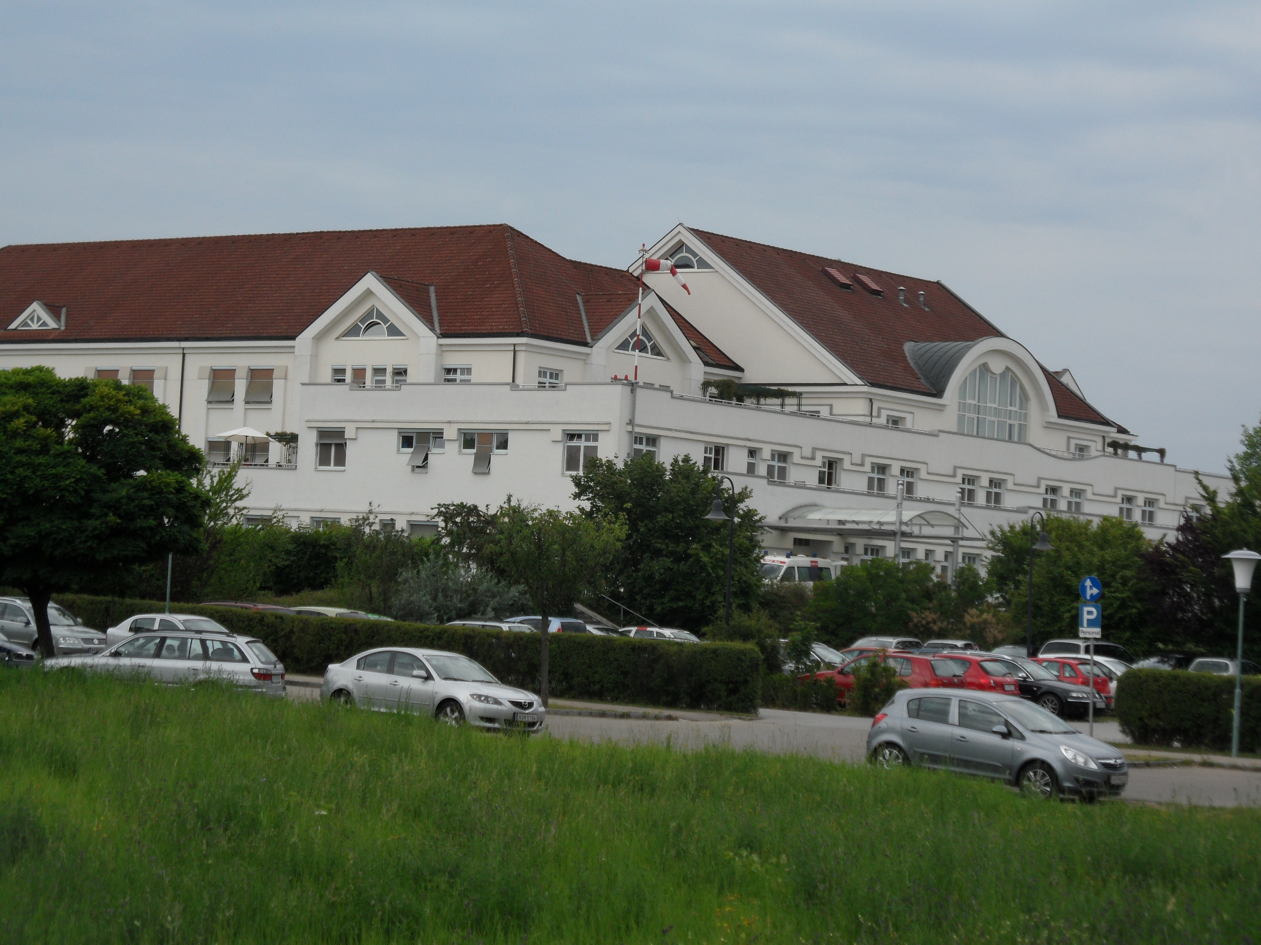 Zemská klinika pro část Weinviertel v Hollabrunnu.